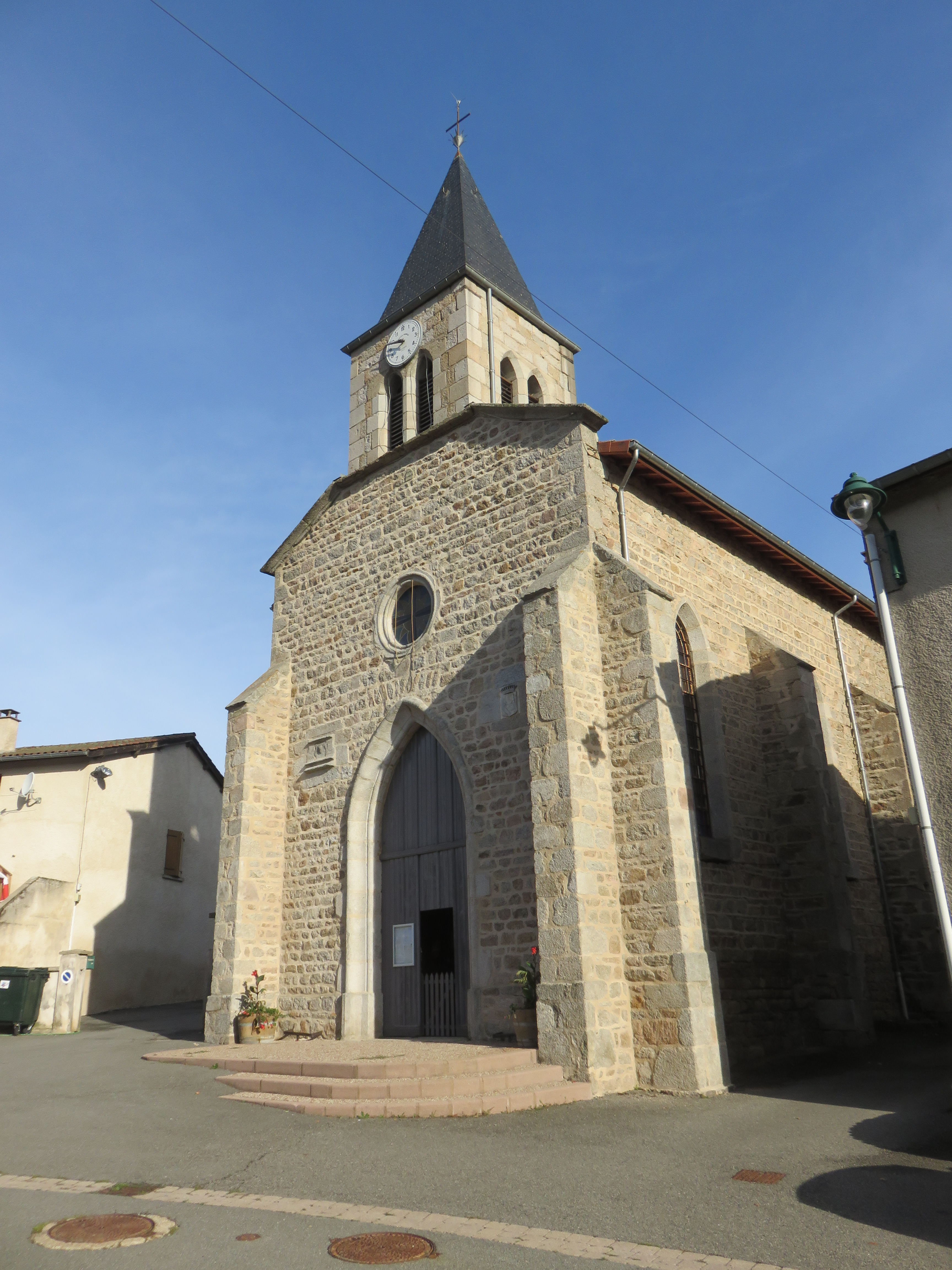 Vue de l'église Saint-Georges de Chausseterre (Loire, France).